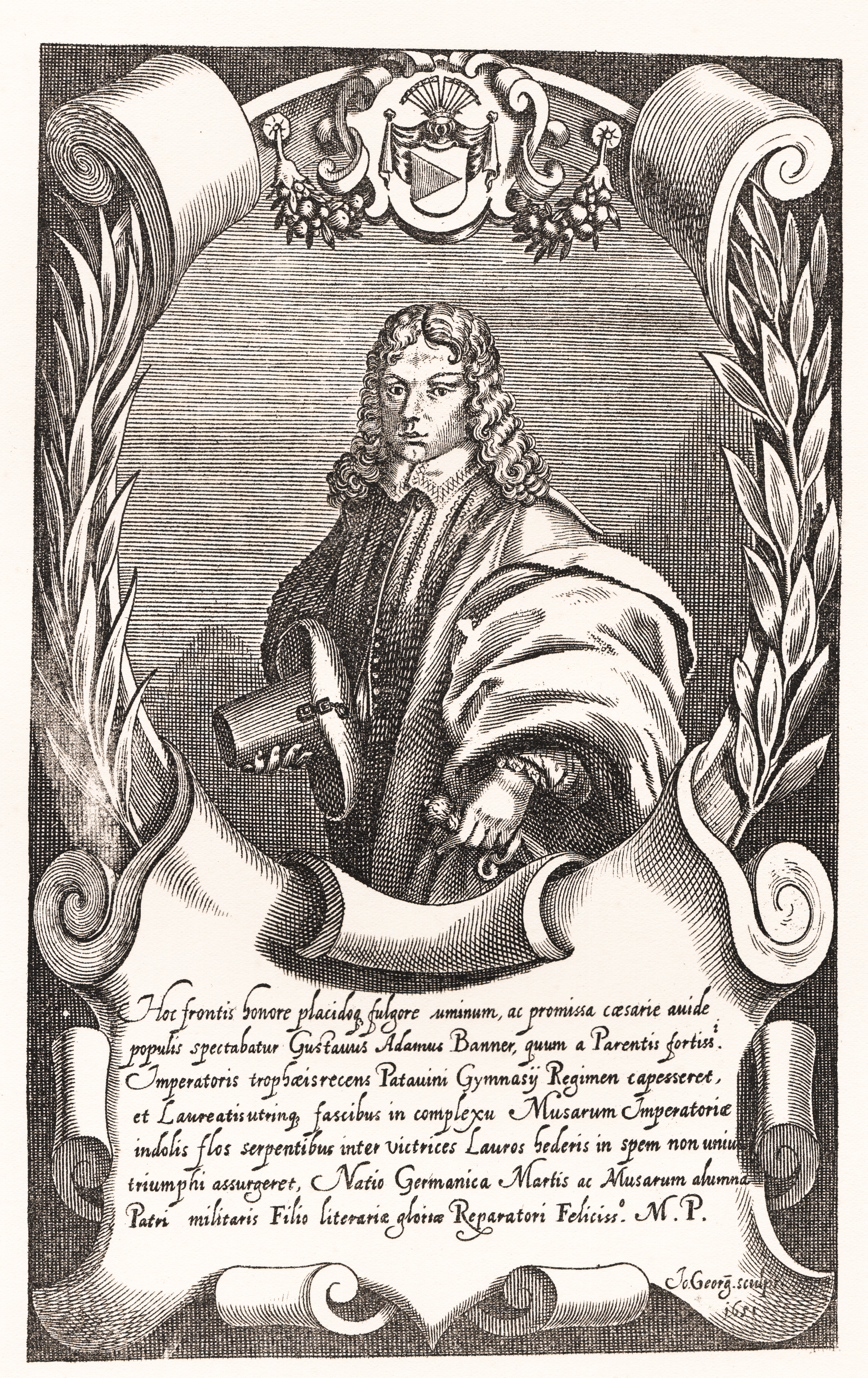 Gustaf Adam Banér (1624-1681).